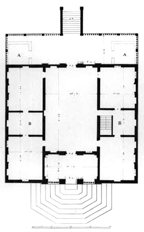 Pianta di Villa Caldogno (1542), attribuita all'architetto Andrea Palladio